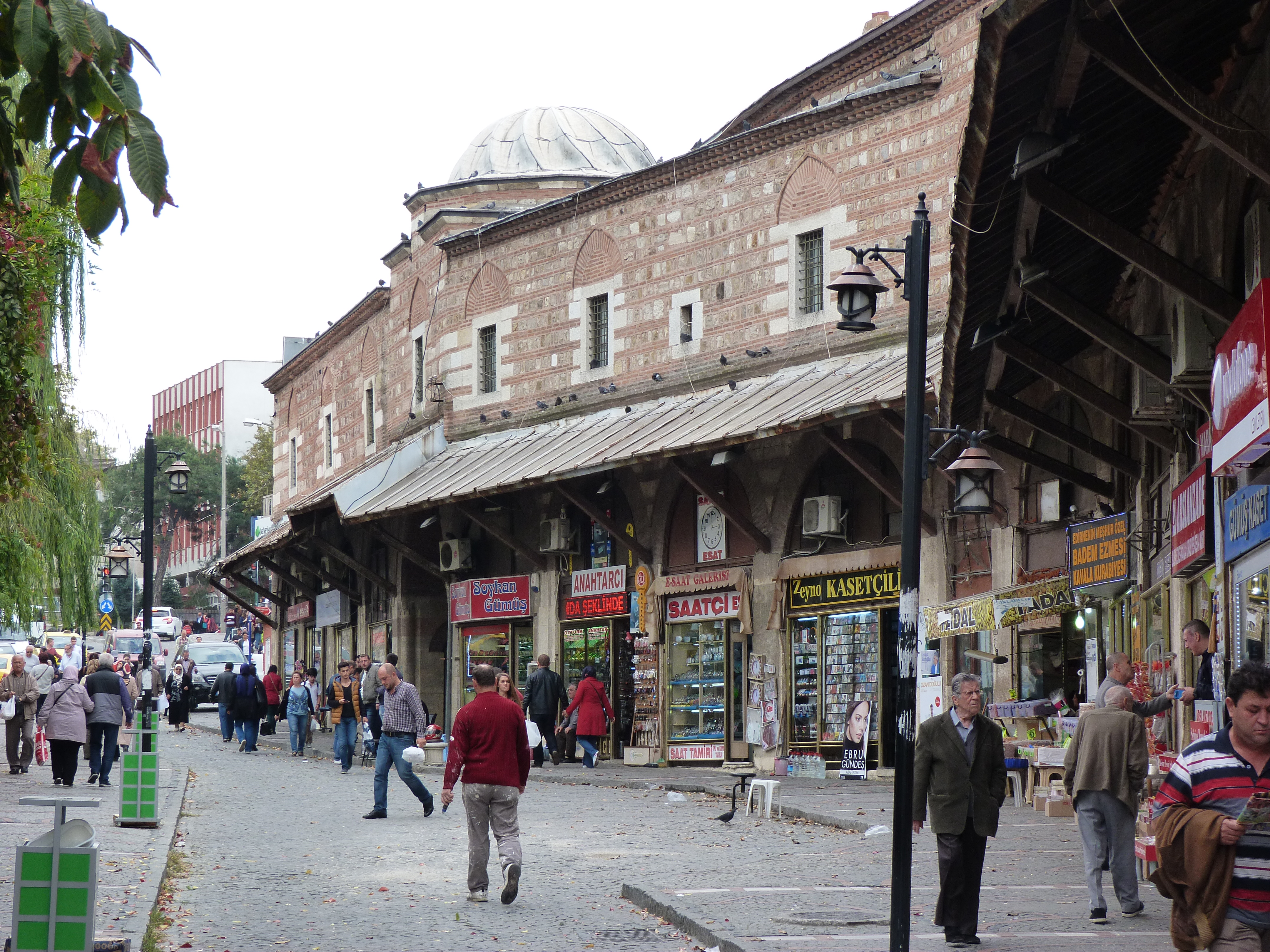 A felvétel 2014. október 22-én kedden készült Edirnében. ©© Derzsi Elekes Andor, Budapest, 2014, A kép egészben, vagy részletekben másolását, bármilyen úton történő sokszorosítását és felhasználását a szerző ellenérték nélkül, jogutódjaira is kihatóan megengedi. Az engedély kiterjed a kereskedelmi célú hasznosításra is. Kéri azonban nevének feltüntetését a felhasználás során. A Metapolisz sorozat valamennyi képe és filmje Creative Commons alatti valamint kereskedelmi - for profit - célra is felhasználható. Ajánlott hivatkozás: Derzsi Elekes Andor: Metapolisz DVD line